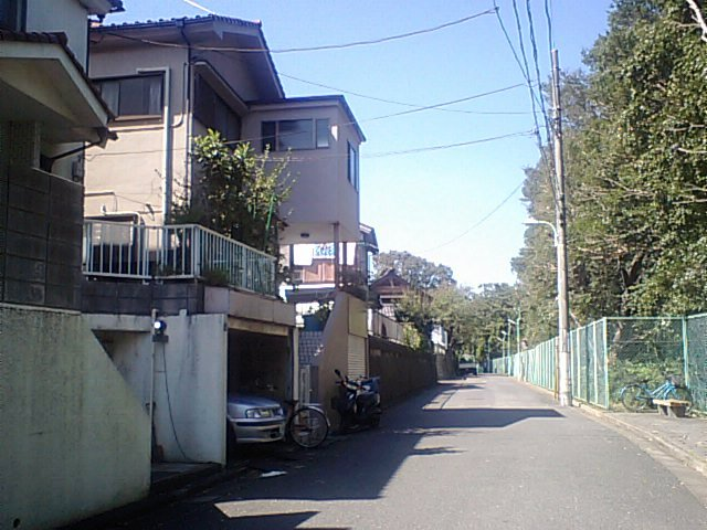 東京都板橋区大門・諏訪神社裏。